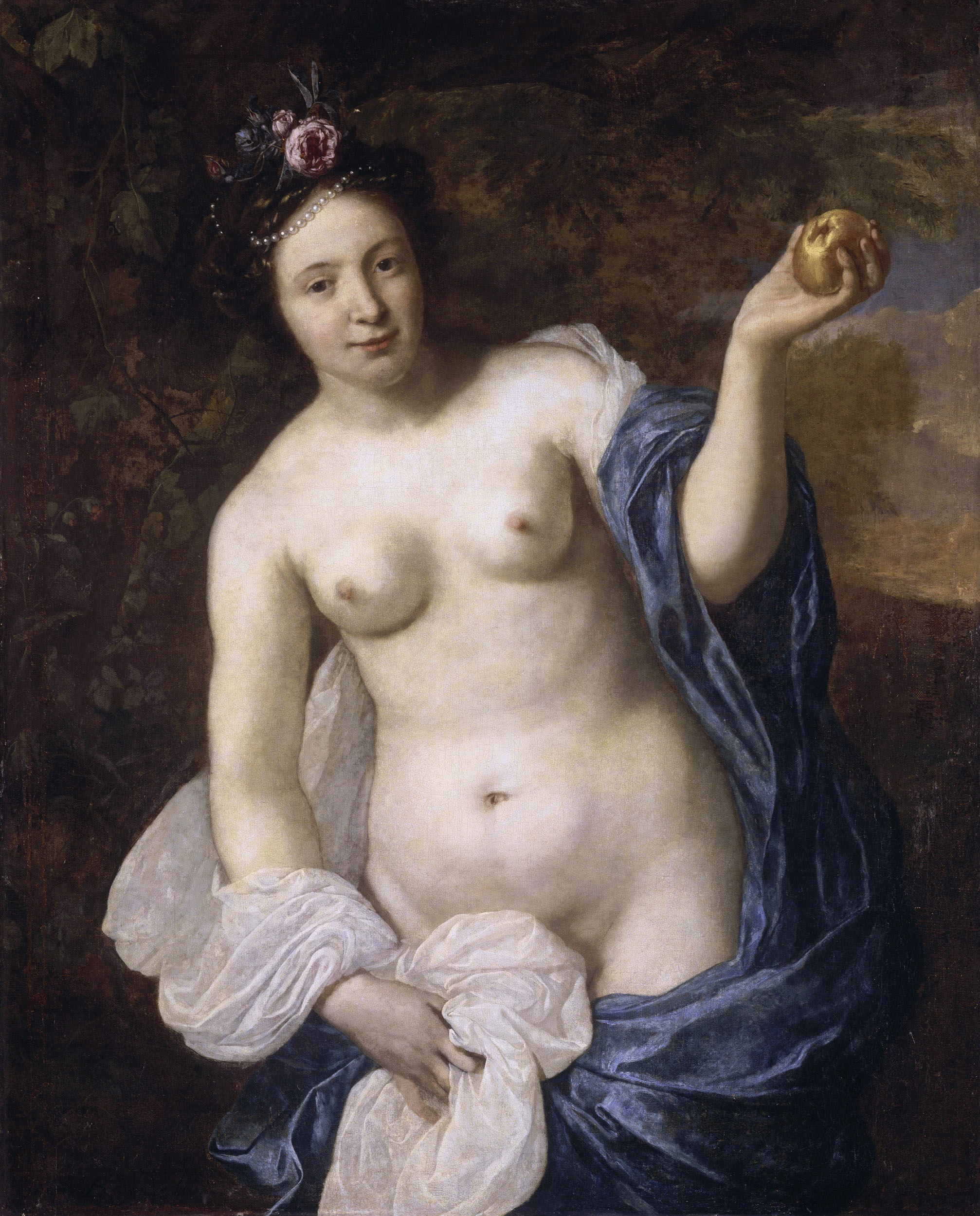 Venus met de appel